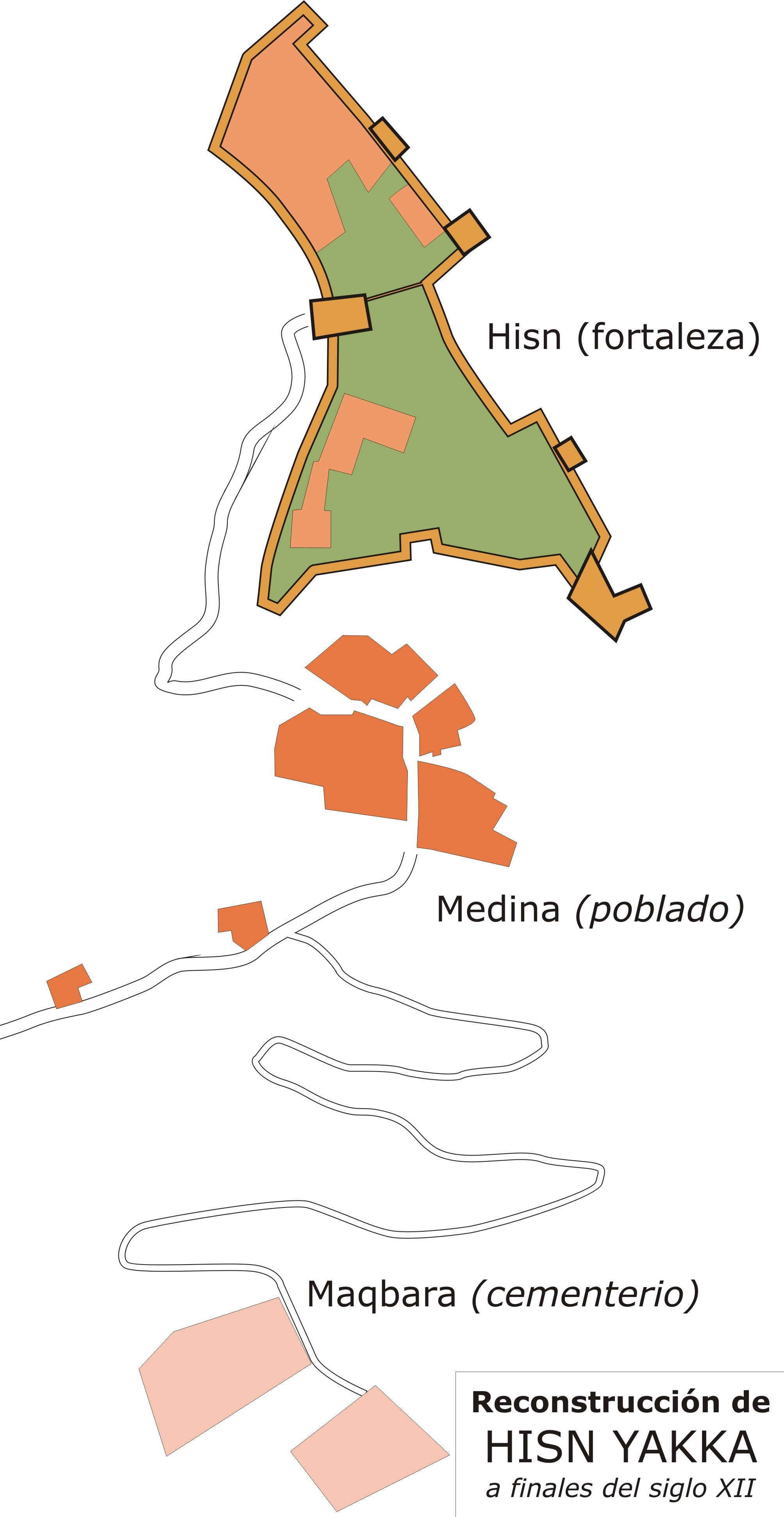 Reconstrucción hipotética de Hisn Yakka, antiguo poblado árabe predecesor de Yecla